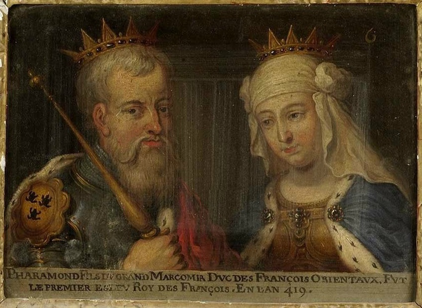 Portrait de Pharamond, roi mythique des Francs, et de son épouse Argotte, princesse cimbre. On notera la présence du blason supposé de Pharamond avec les trois grenouilles sable sur fond or. Ce tableau fait partie d'une suite d'une soixantaine de double-portraits représentant les ducs et duchesses de Lorraine ainsi que leurs ancêtres supposés.